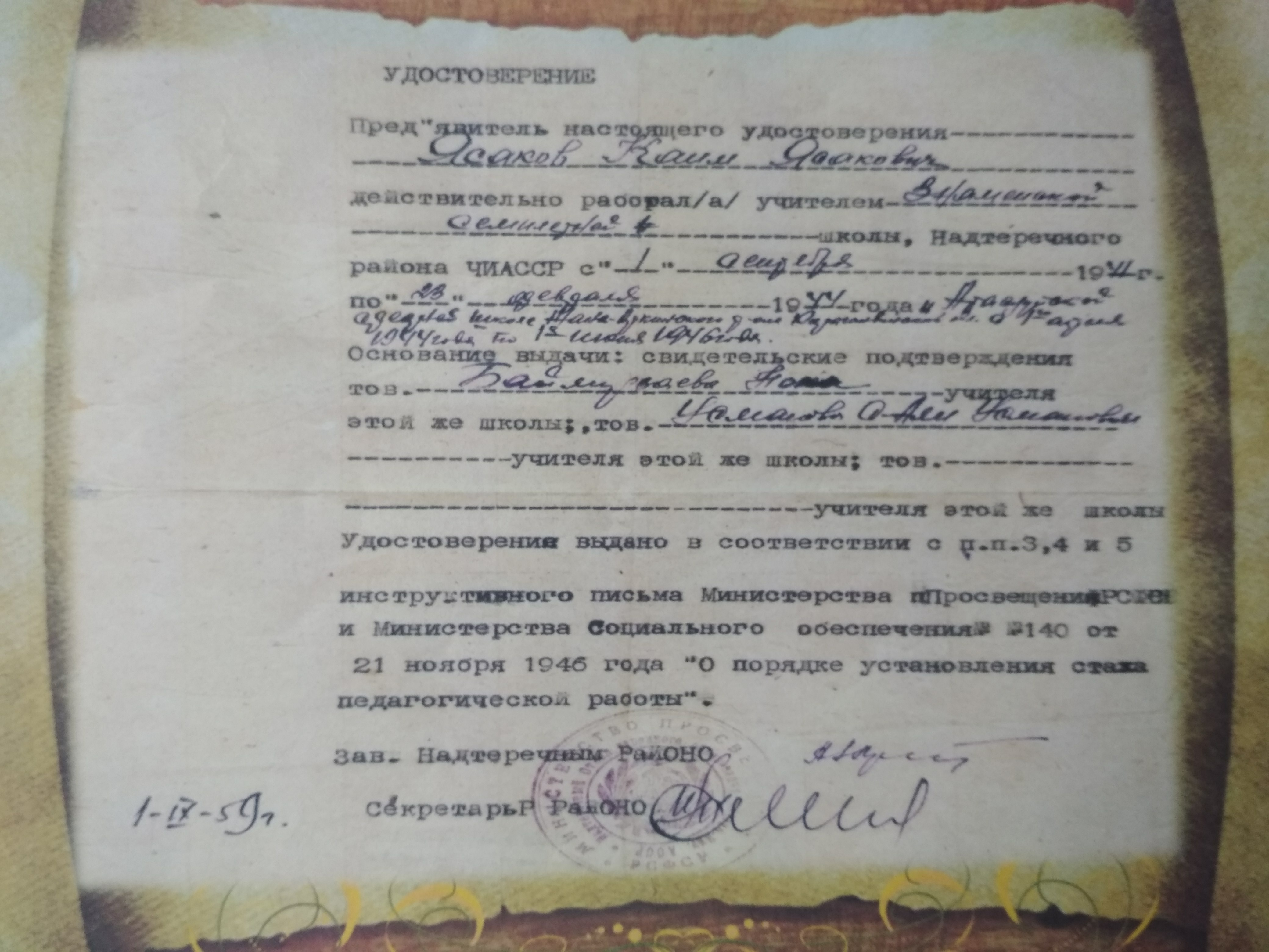 Нохчийн: КъахIима болх барах долу тешалла